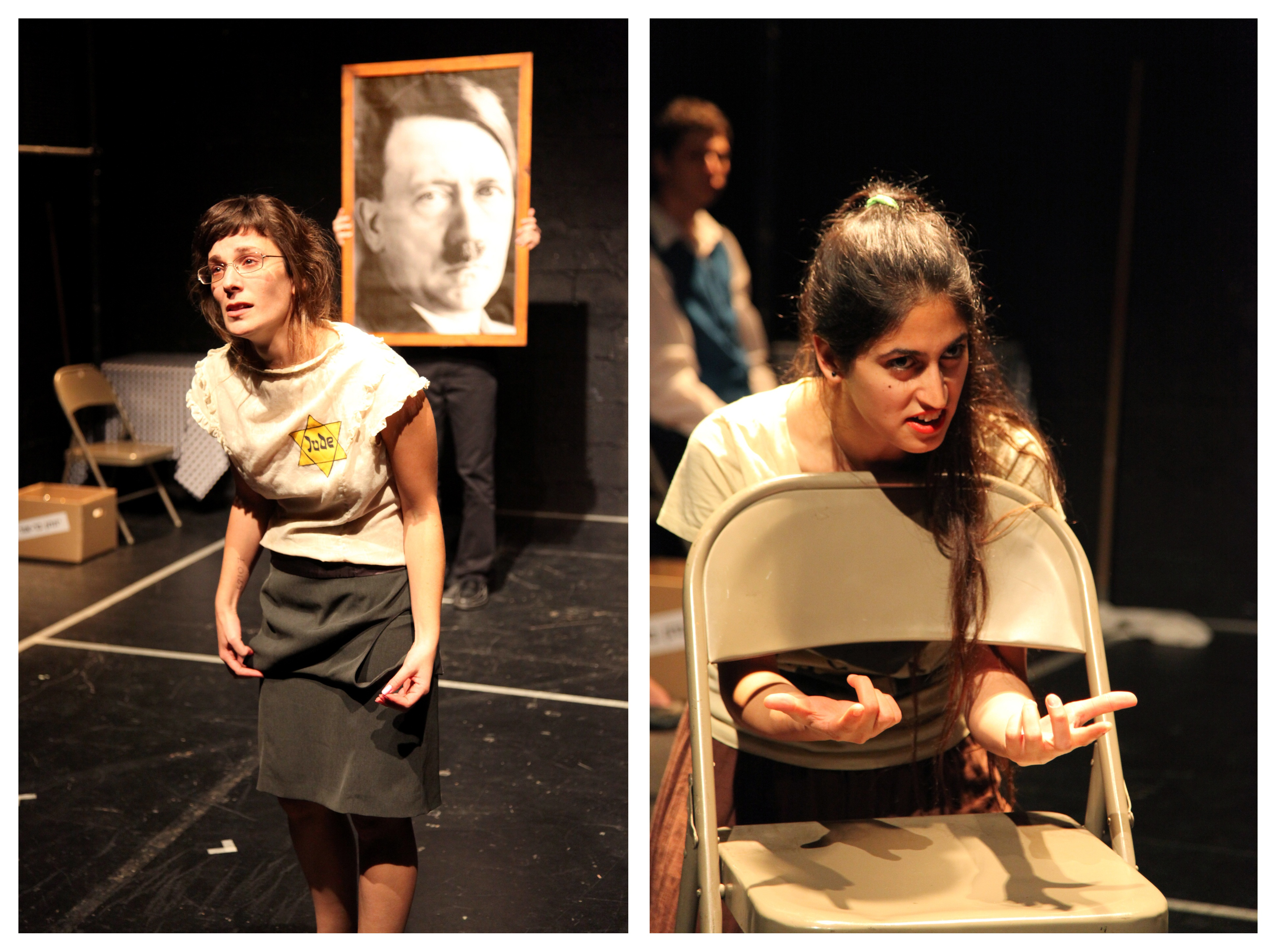 ההצגה הוקי-פוקי